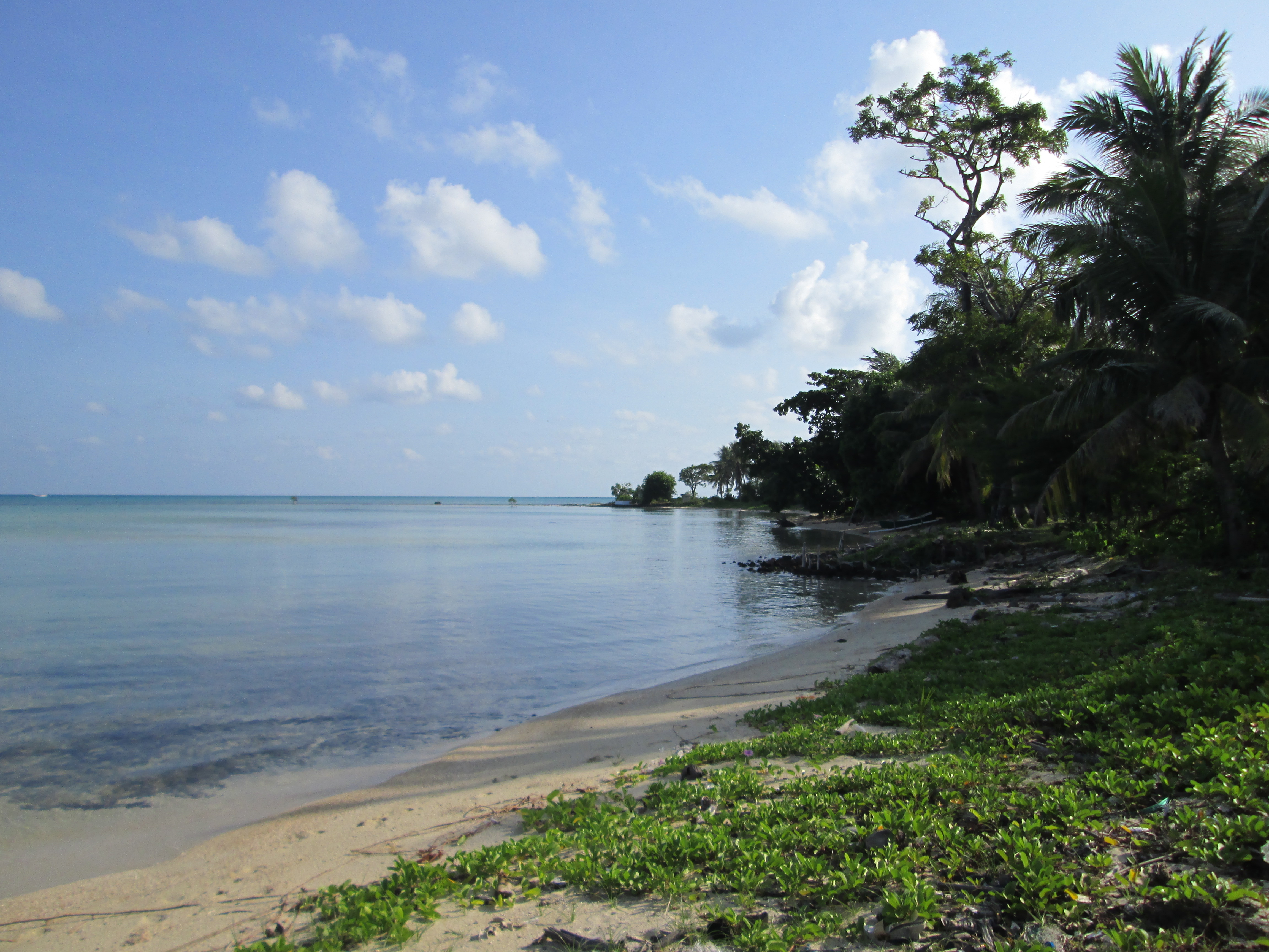 Jl. Agustinus Adi Sucipto, Masalima, Masalembu, Kabupaten Sumenep, Jawa Timur, Indonesia